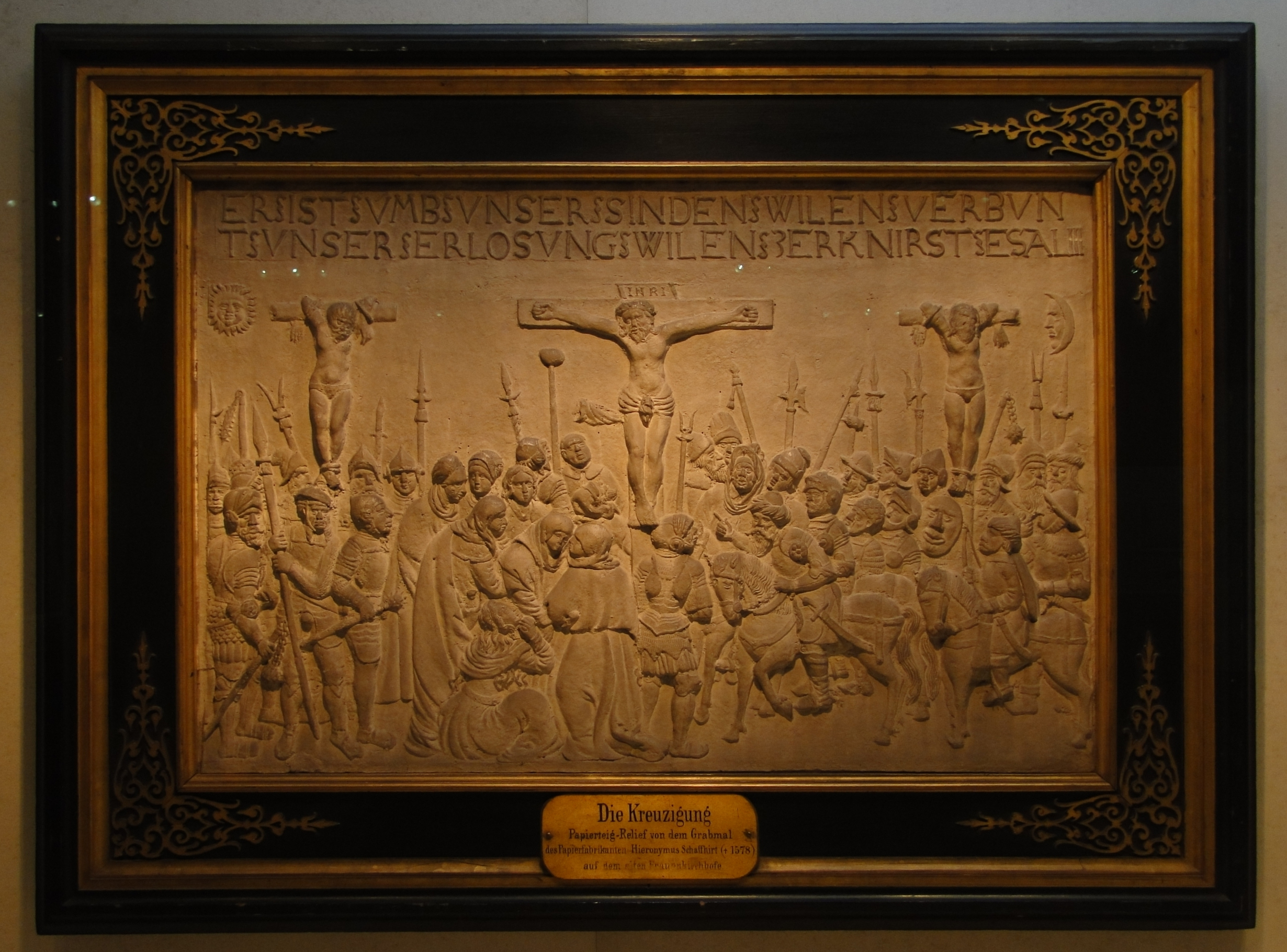 Papierteigrelief vom Epitaph von Hieronymus Schaffhirt, alter Frauenkirchhof in Dresden